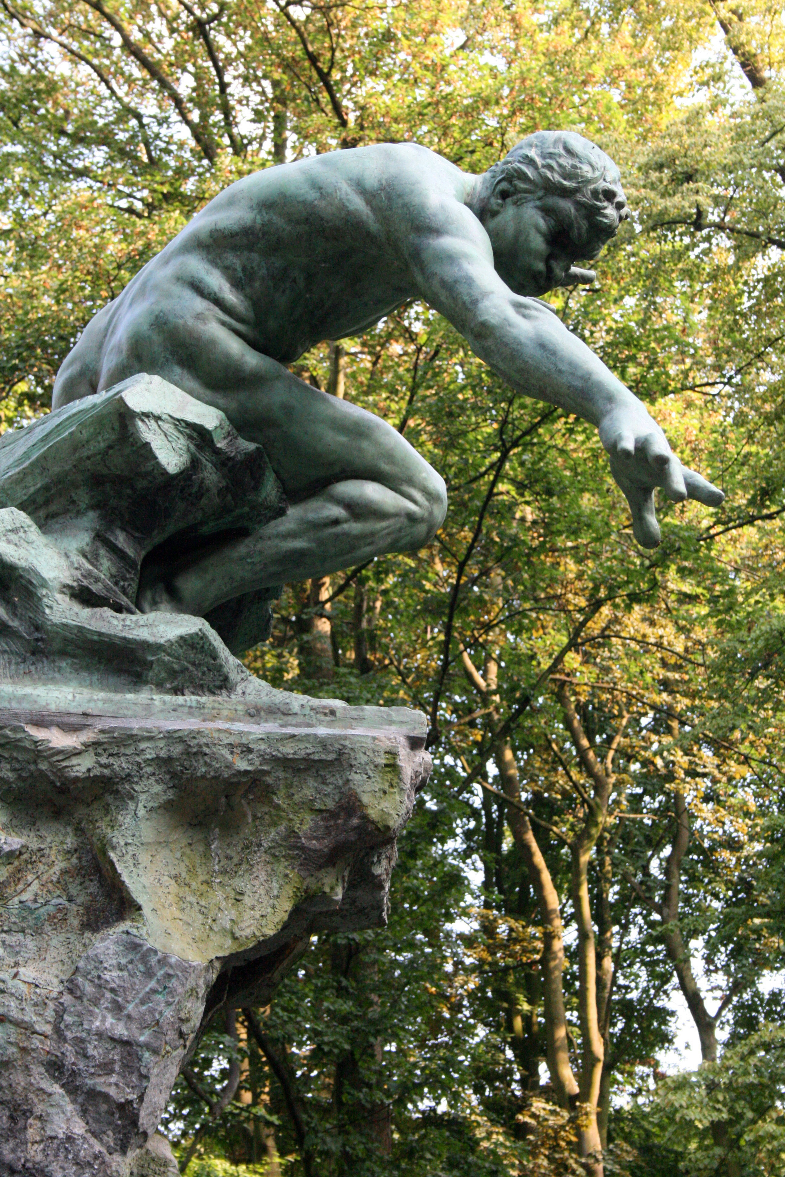 Parc Josaphat, Schaerbeek (Bruxelles), belgique. Statue de Borée de Joseph Van Hamme